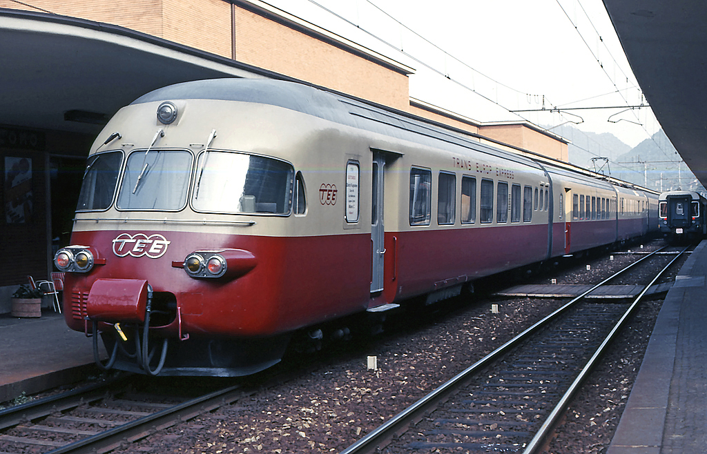 Elettrotreno RAe 1053 in sosta a Como S. Giovanni come TEE 57 "Gottardo" (Zürich HB-Milano Centrale)